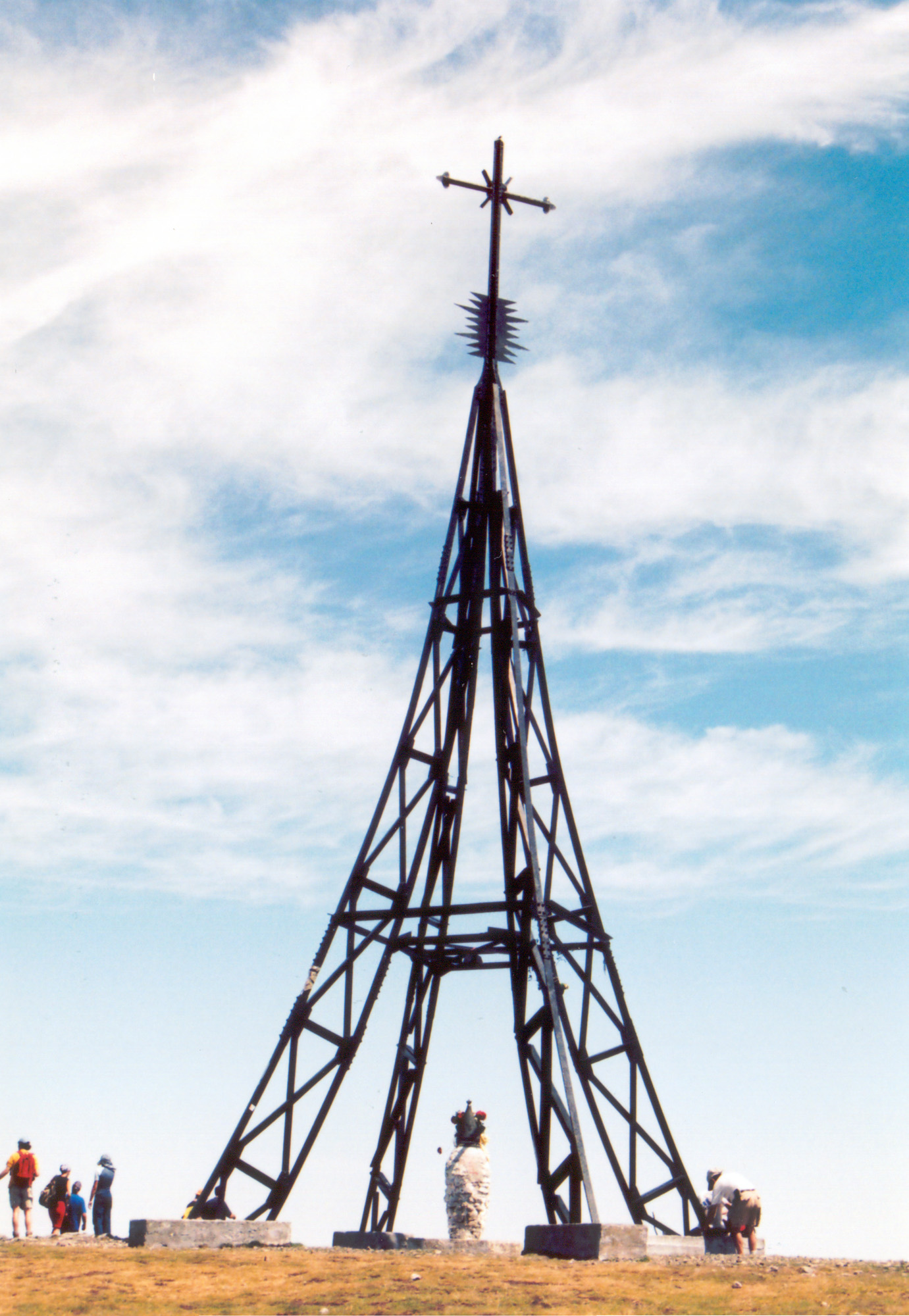 Cruz en el monte Gorbea, País Vasco. Taken by myself. --Ardo Beltz 15:59, 13 November 2005 (UTC)